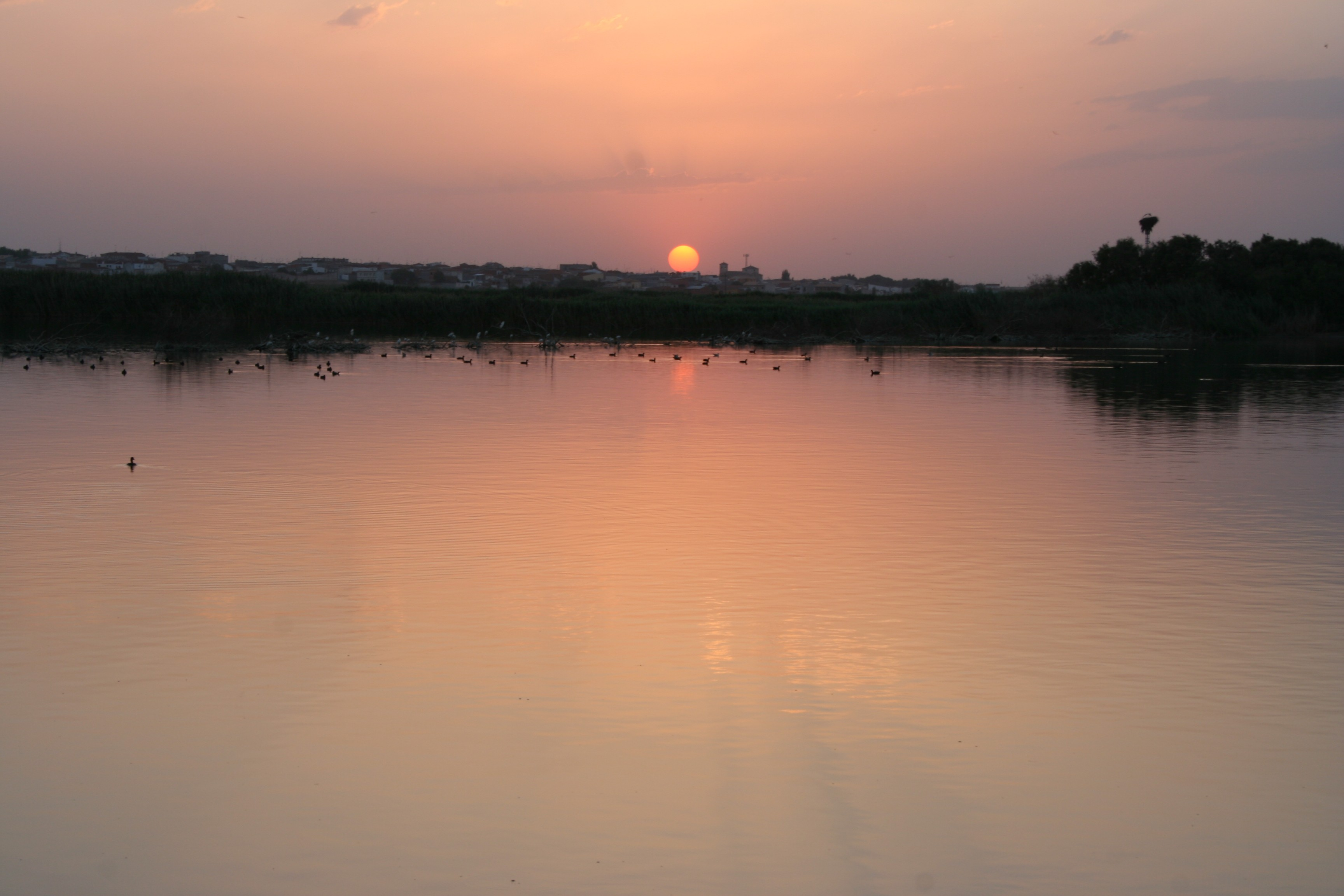 Puesta de sol en la laguna de Miguel Esteban